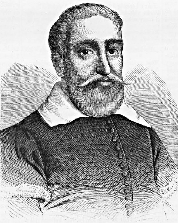 Szenczi Molnár Albert (1574–1634) református lelkész, nyelvtudós, filozófus, zsoltárköltő, egyházi író, műfordító portréja